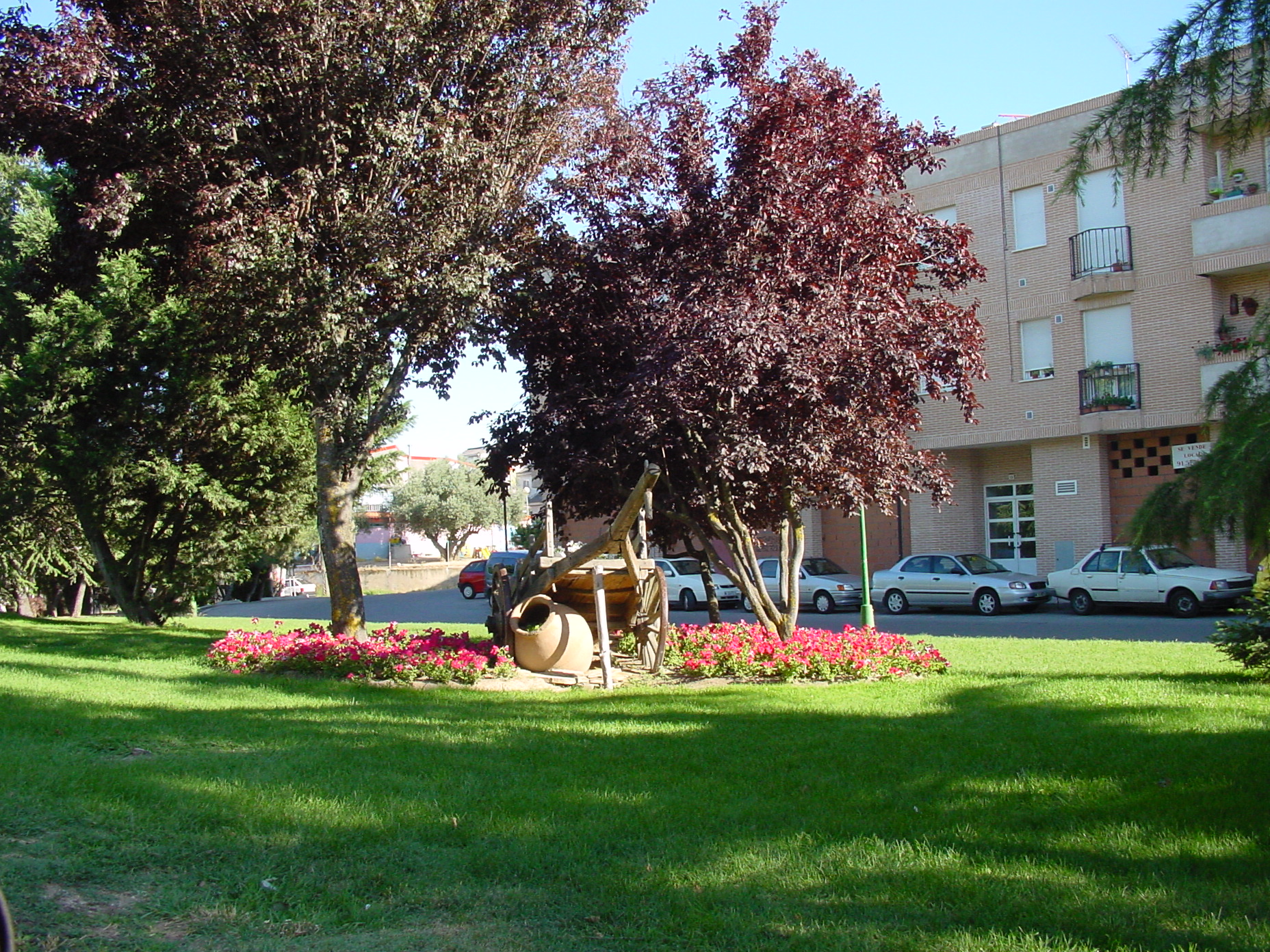 Parque con carro en Griñón.